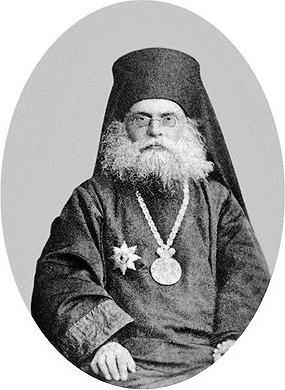 Владимир (Петров), еп. Бийский. Фотография. 80-е гг. XIX в.